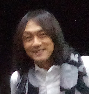 ต้น แมคอิทอช หรือ วงศกร รัศมิทัต งานแสดง "The Palace and the Originals" 4 กันยายน 2016 Bitec Bangna Hall 106